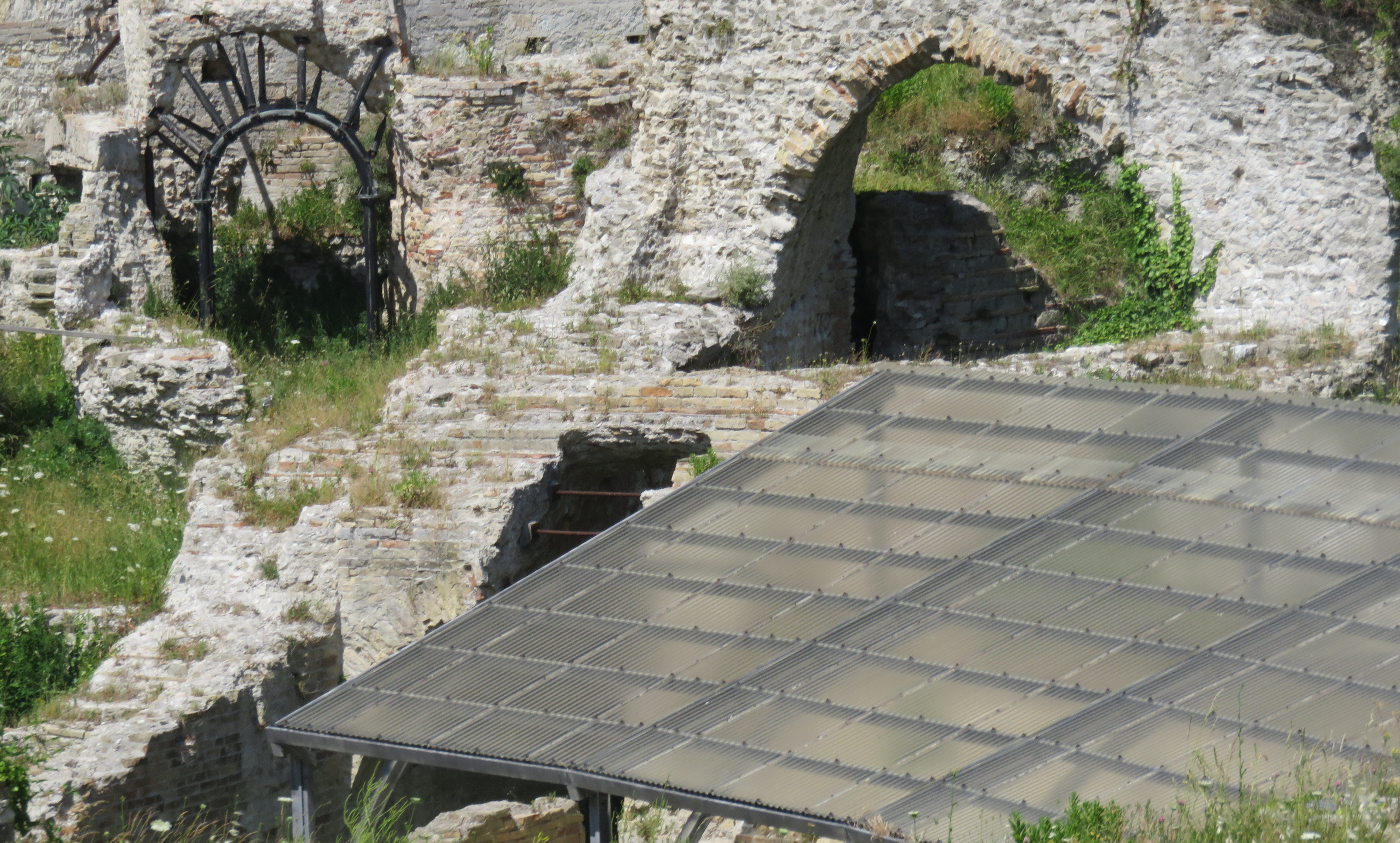 Anfiteatro romano di Ancona - porta libitenensis